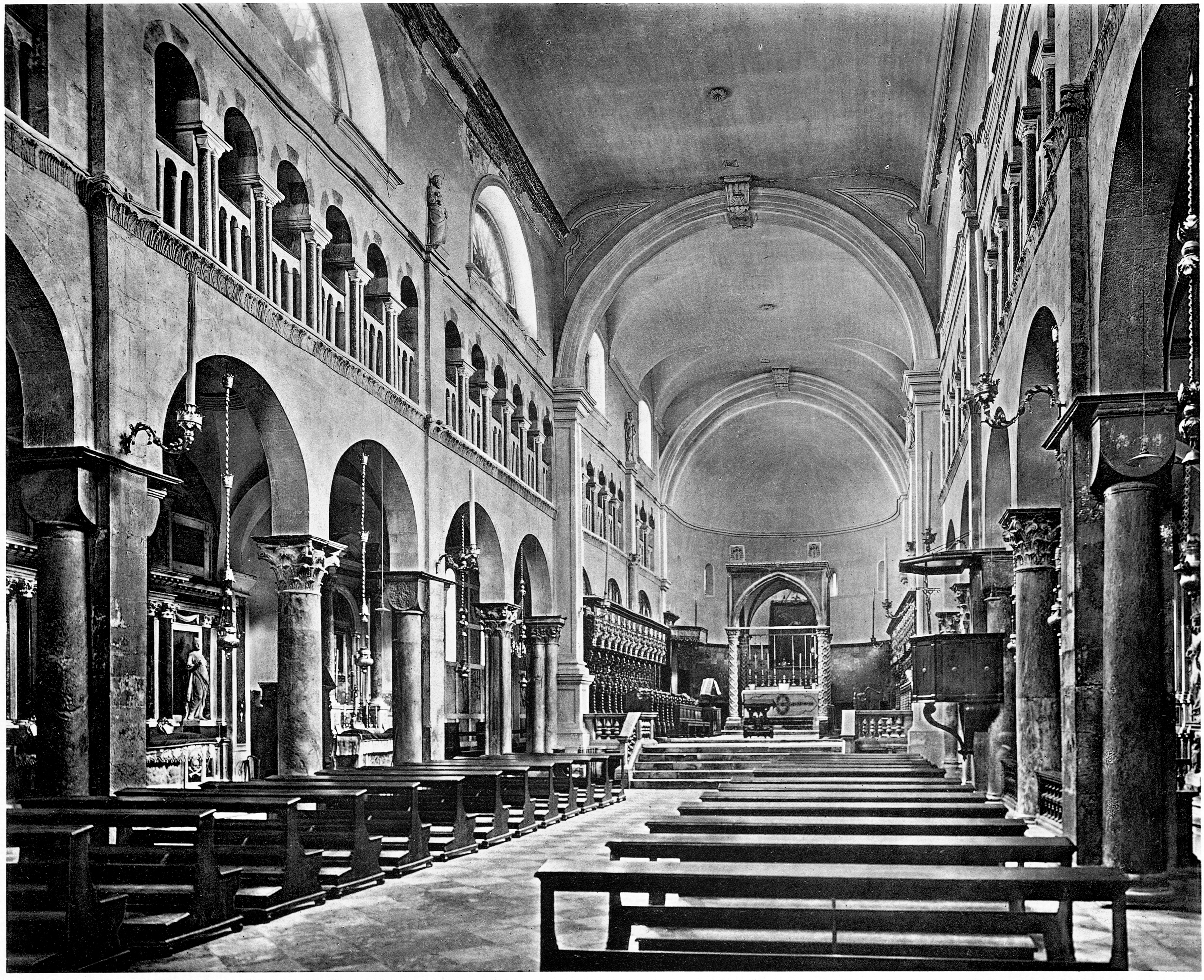 Denkmäler der Kunst in Dalmatien, Herausgegeben von Georg Kowalczyk, mit einer Einleitung von Cornelius Gurlitt. 132 Lichtdrucktafeln nach Naturaufnahmen des Herausgebers Georg Kowalczyk sowie nach Kupfern aus dem Werke von Robert Adam: Ruins of the Palace of the Emperor Diocletian at Spalat(r)o, 1764 Wien, 1910, Verlag von Franz Malota